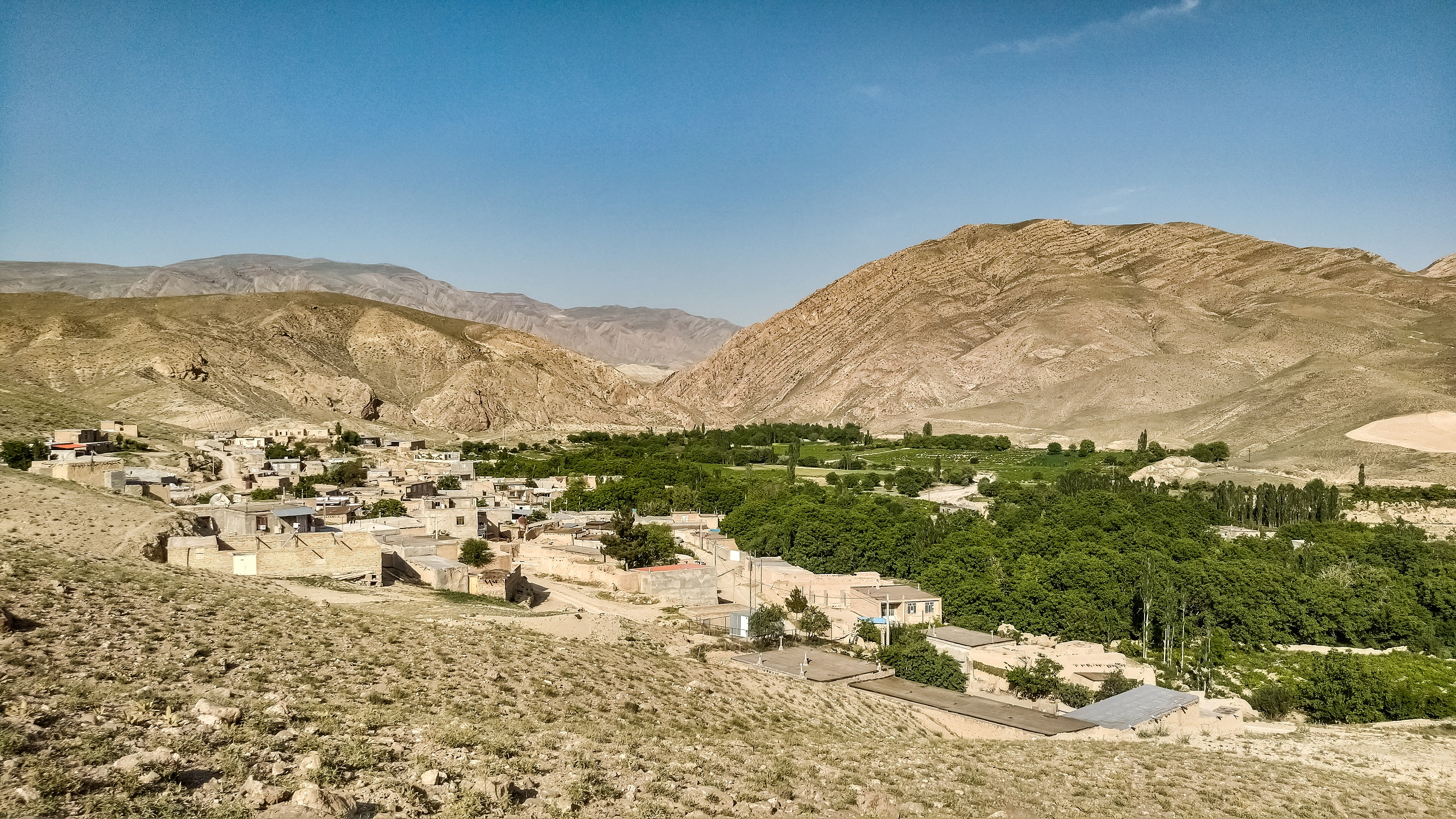 روستای دربند اسفجیر در تیر ماه 1397